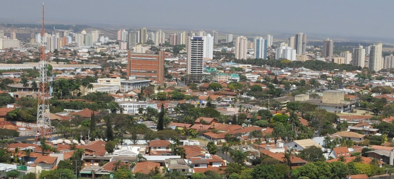 Vista a Partir do Vila Harmonia